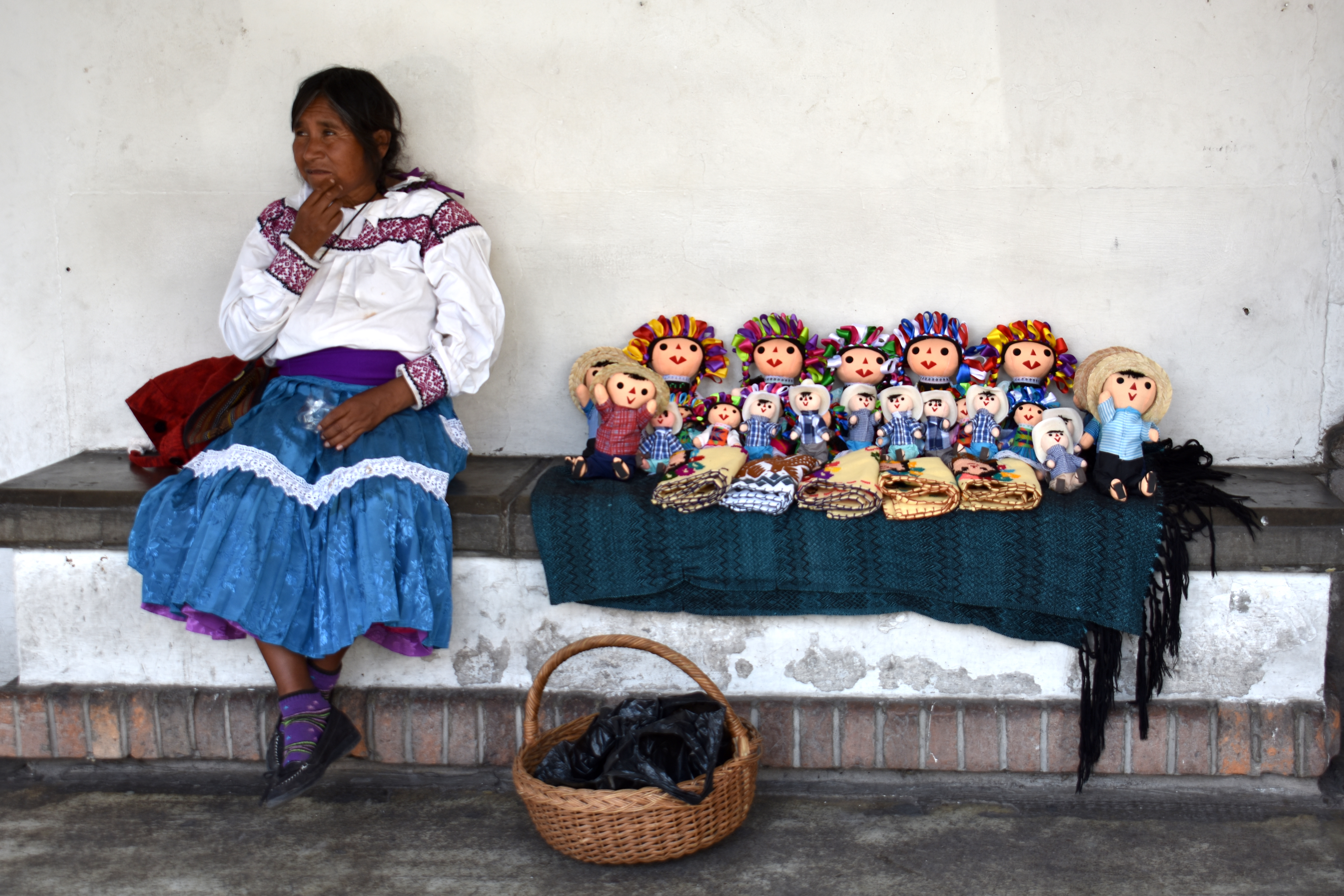 Indígena de la Sierra de Aculco, vende artesanías hechas a mano en el Centro de Aculco, Estado de México.